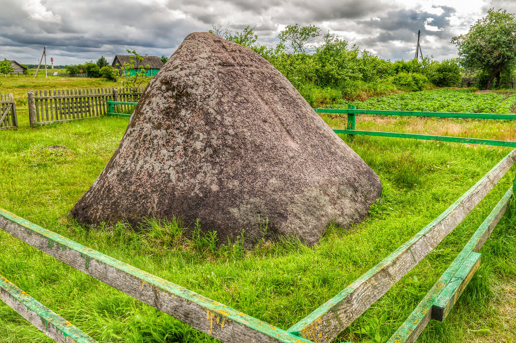 Варацішын крыж